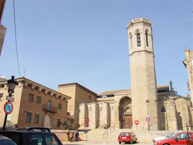 Iglesia de Sant Llorenç